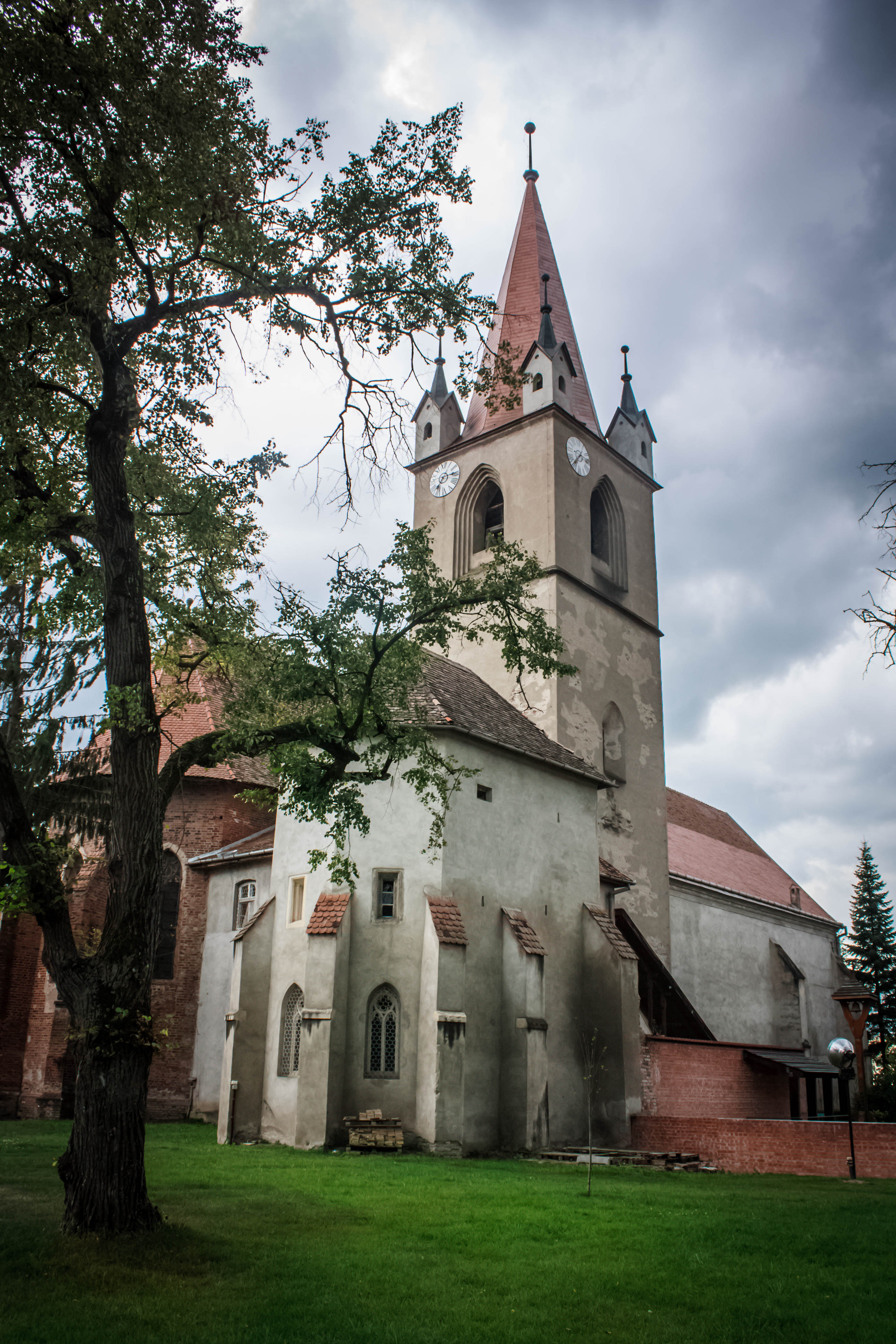 Biserica reformată 01